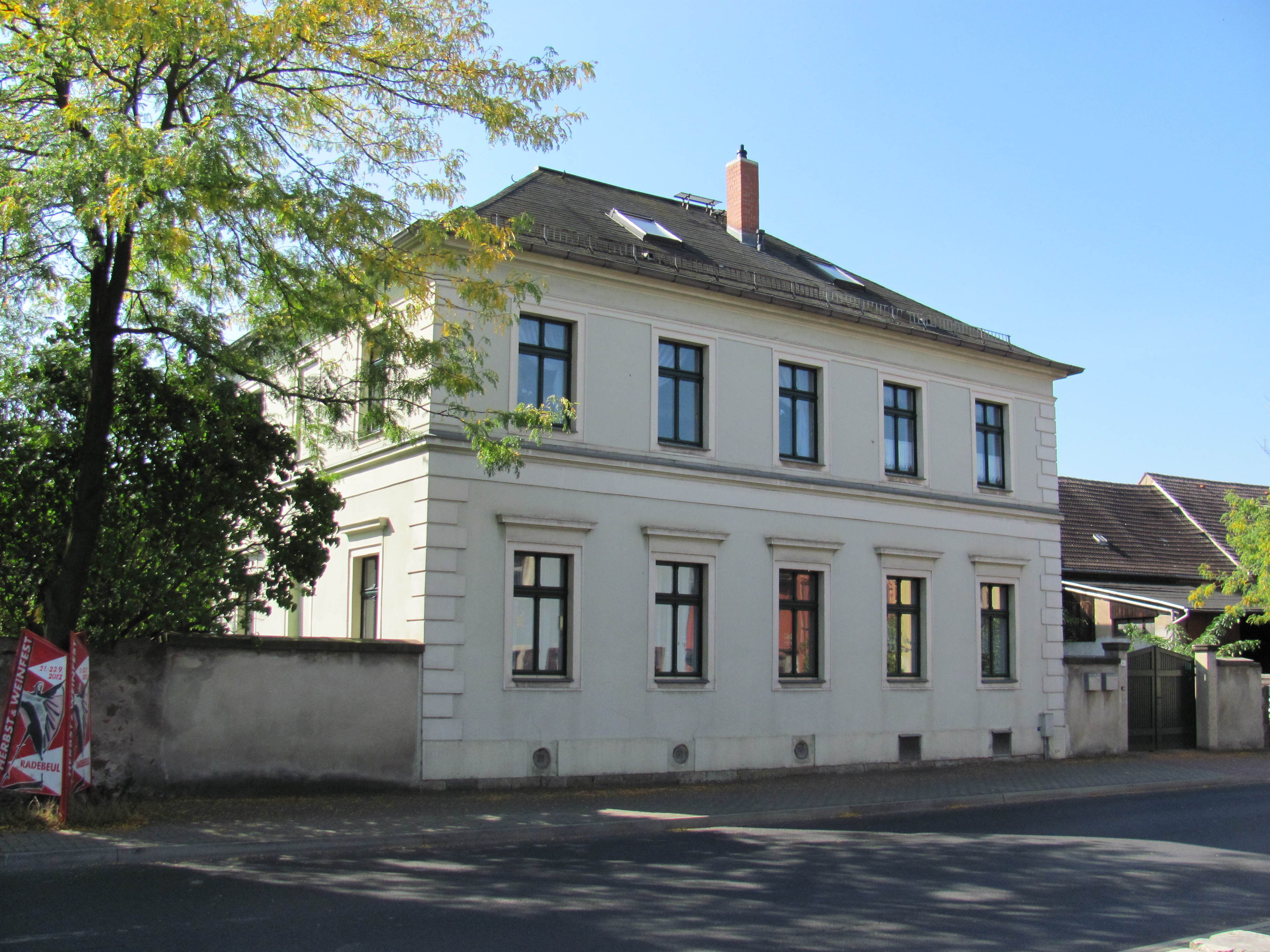 Radebeul Dorfschule Kötzschenbroda